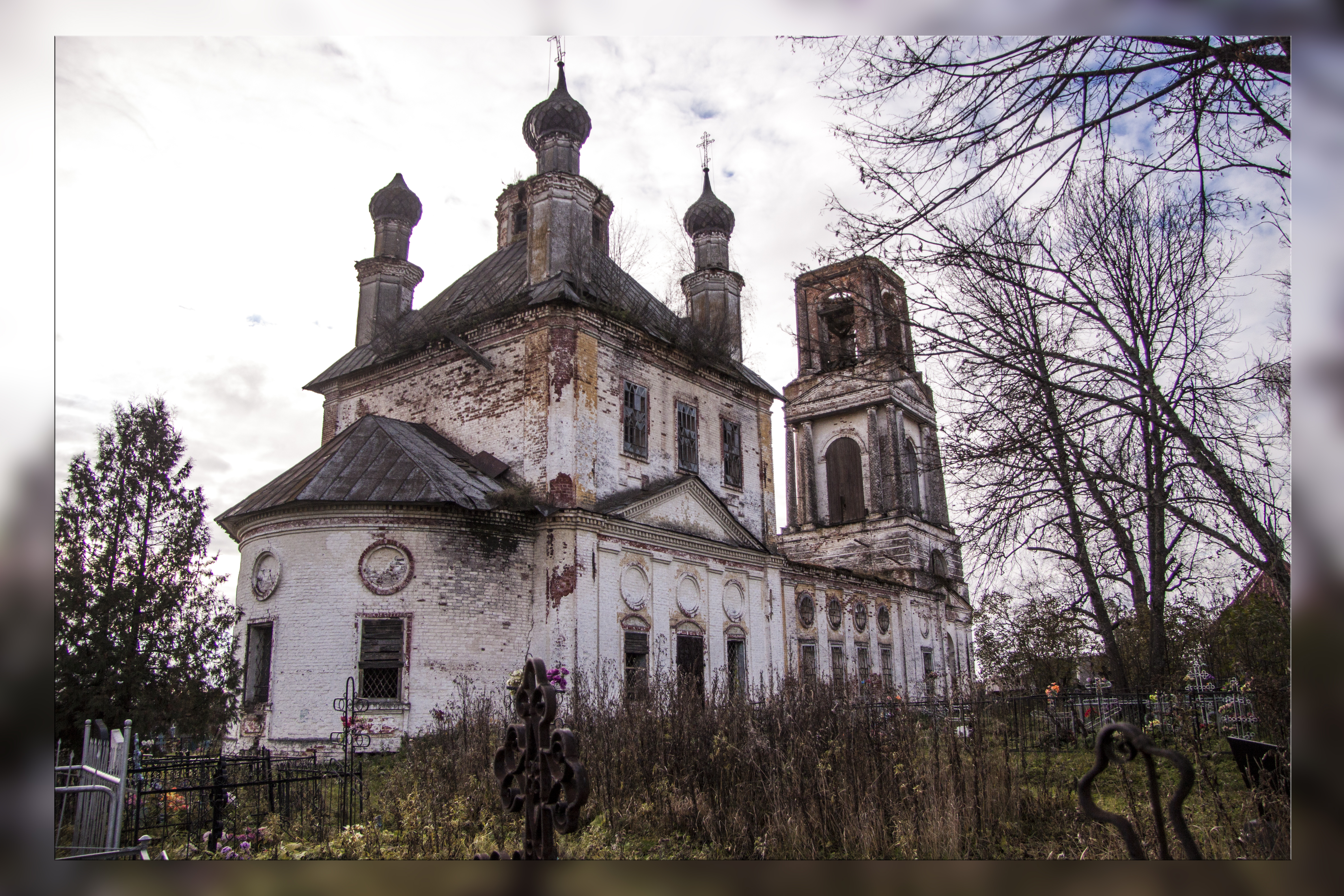 Церковь Троицы (Ярославская область, Любимский район, с. Троица)